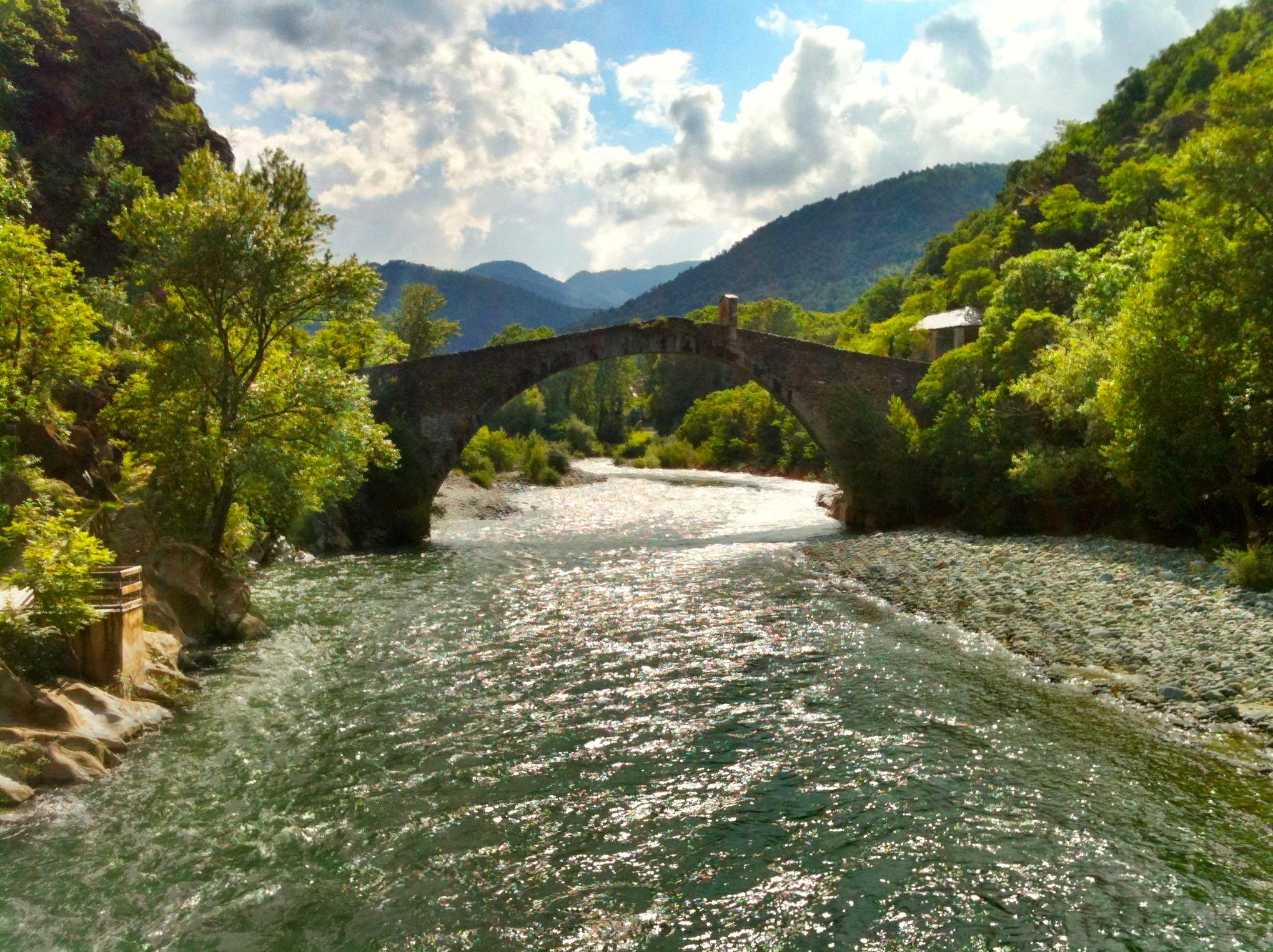 Ponte del diavolo a Lanzo Torinese, by archimedix CC-BY-SA